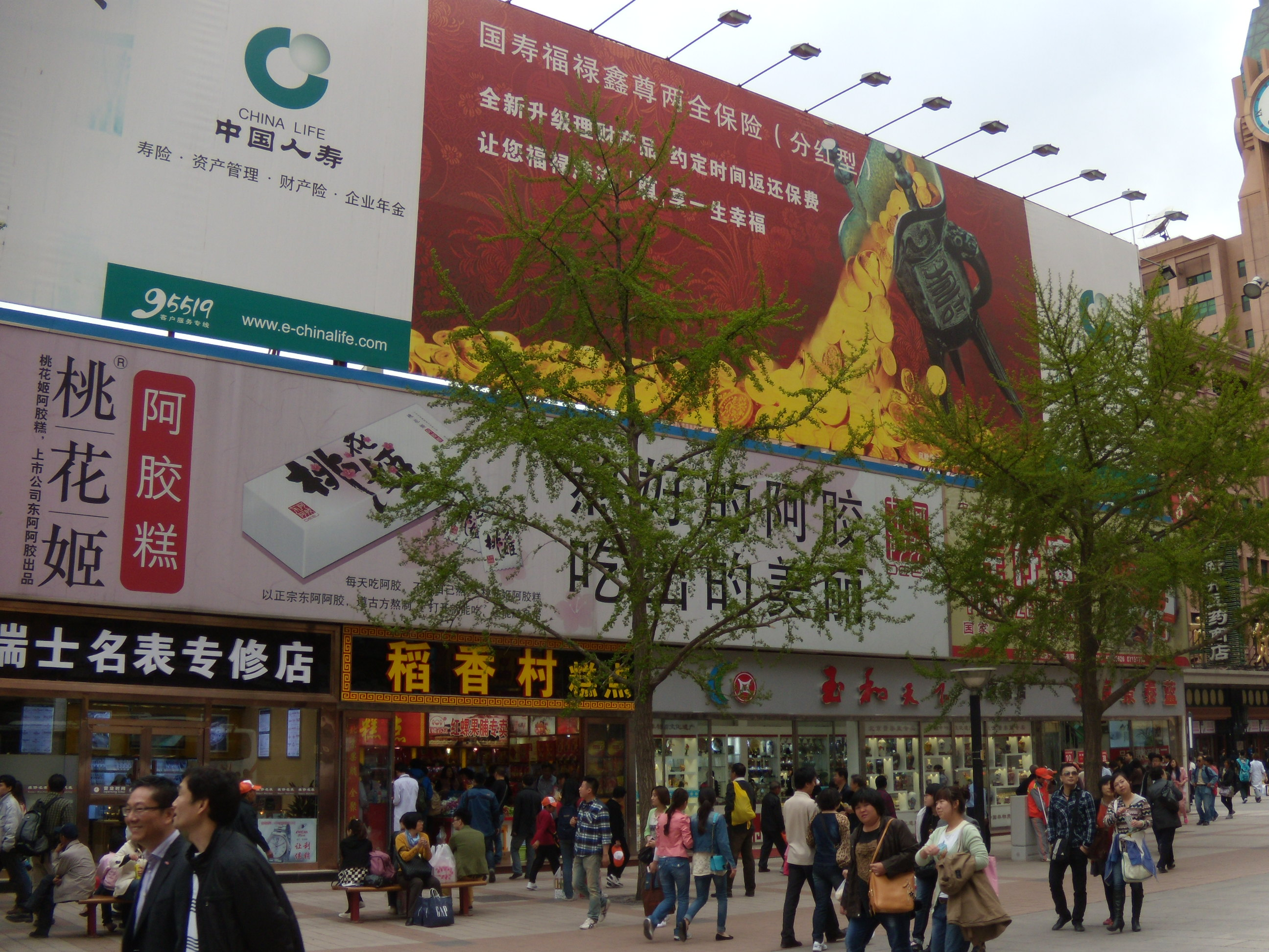 王府井大街王府井国际品牌中心工地东侧